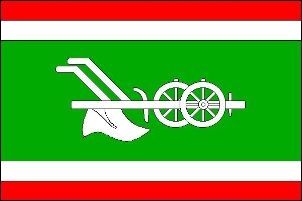 Vlajka obce Lhotka (okres Frýdek-Místek)